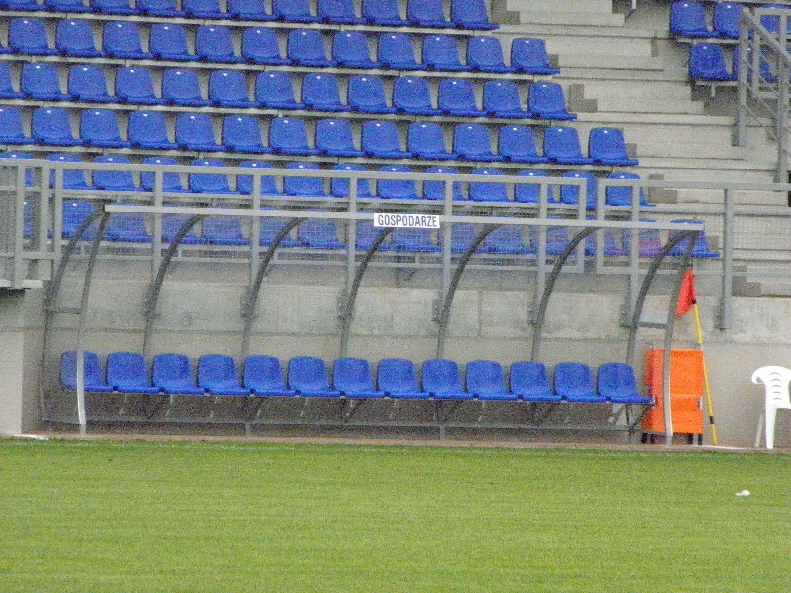 Siedlce-stadion na Błoniach-ławka rezerwowych